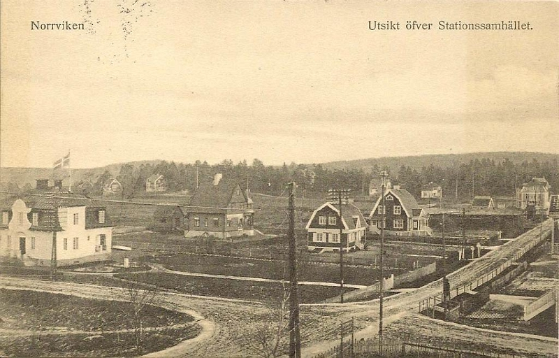 Norrvikens villastad sollentuna vykort